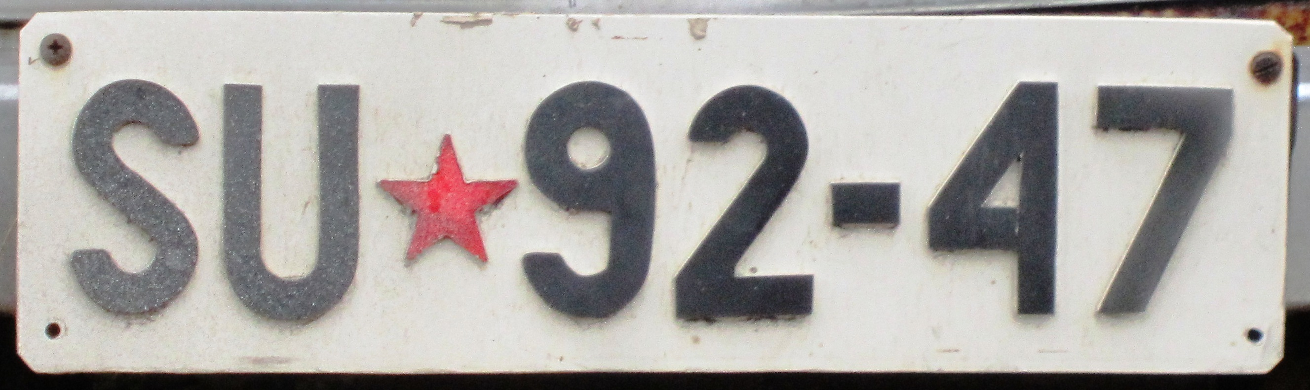 Joegoslavië kentekenplaat Subotica